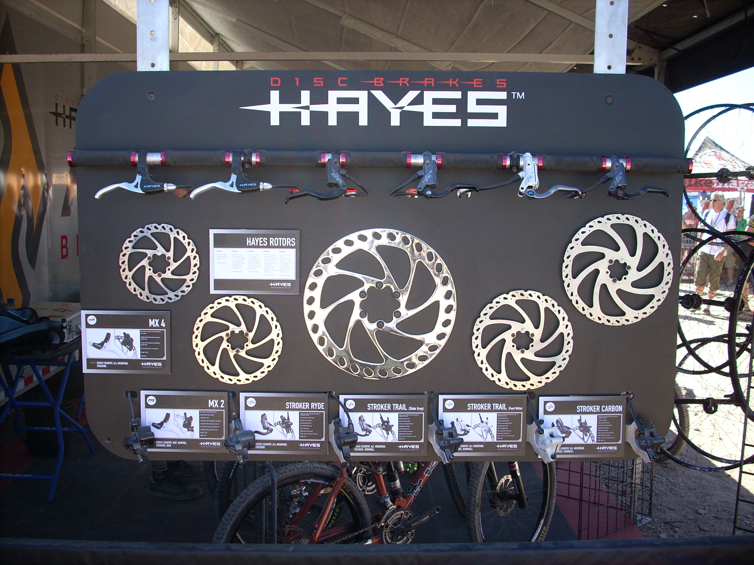 Hayes disk brakes